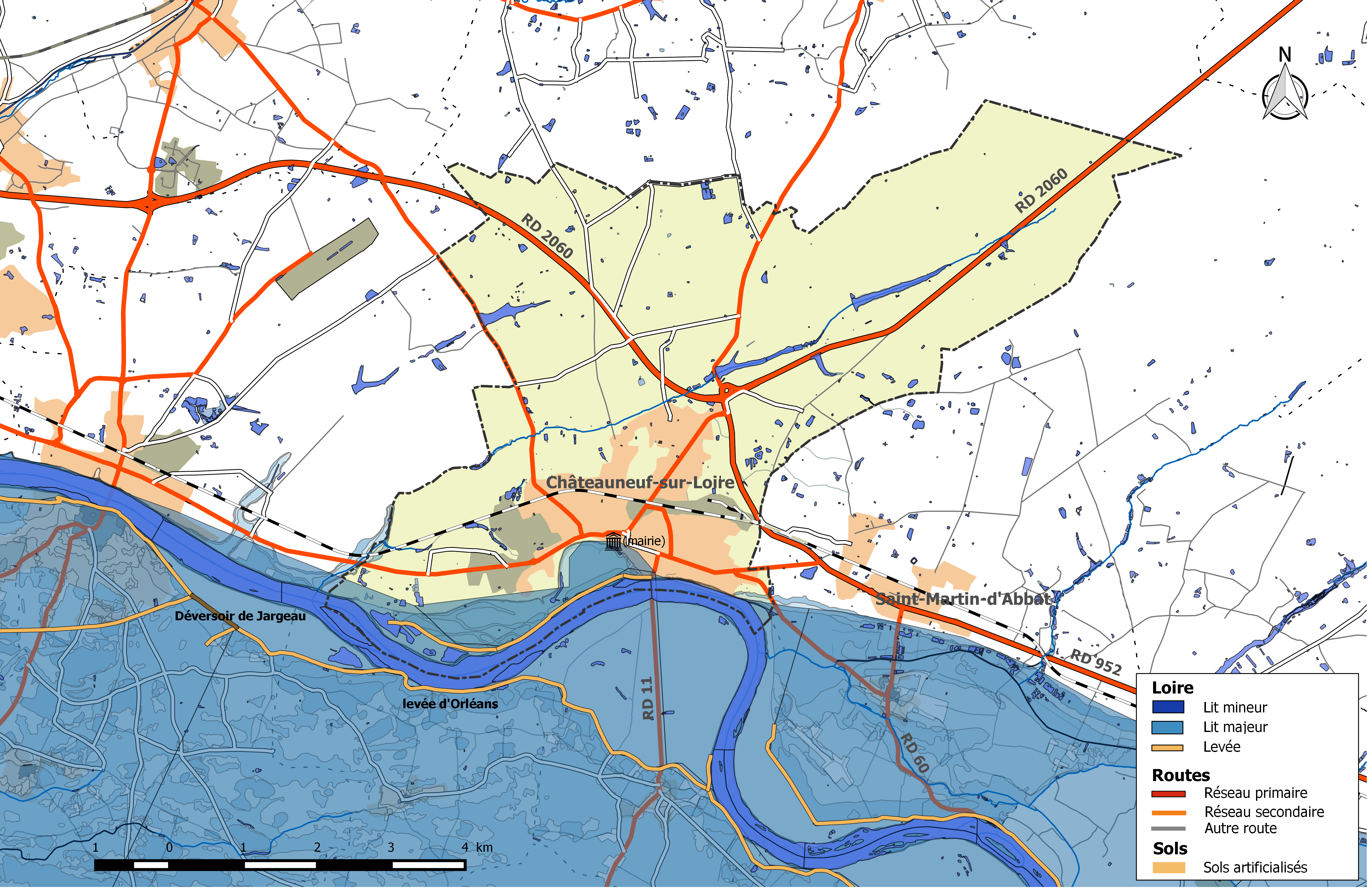 Zone inondable et réseaux hydrographique et routier de la commune de Châteauneuf-sur-Loire.